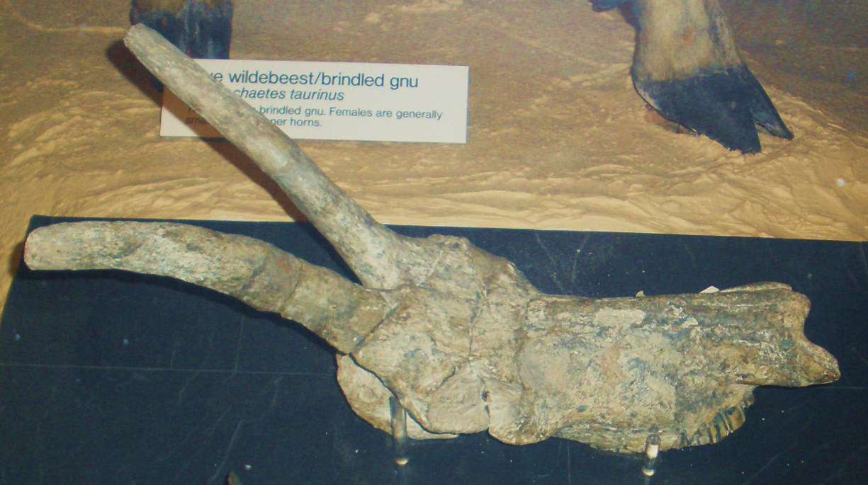 Fossil of Damalops, an extinct mammal -- Took the photo at Natural History Museum, London